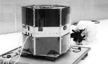 SNOE (Student Nitric Oxide Explorer) satellite